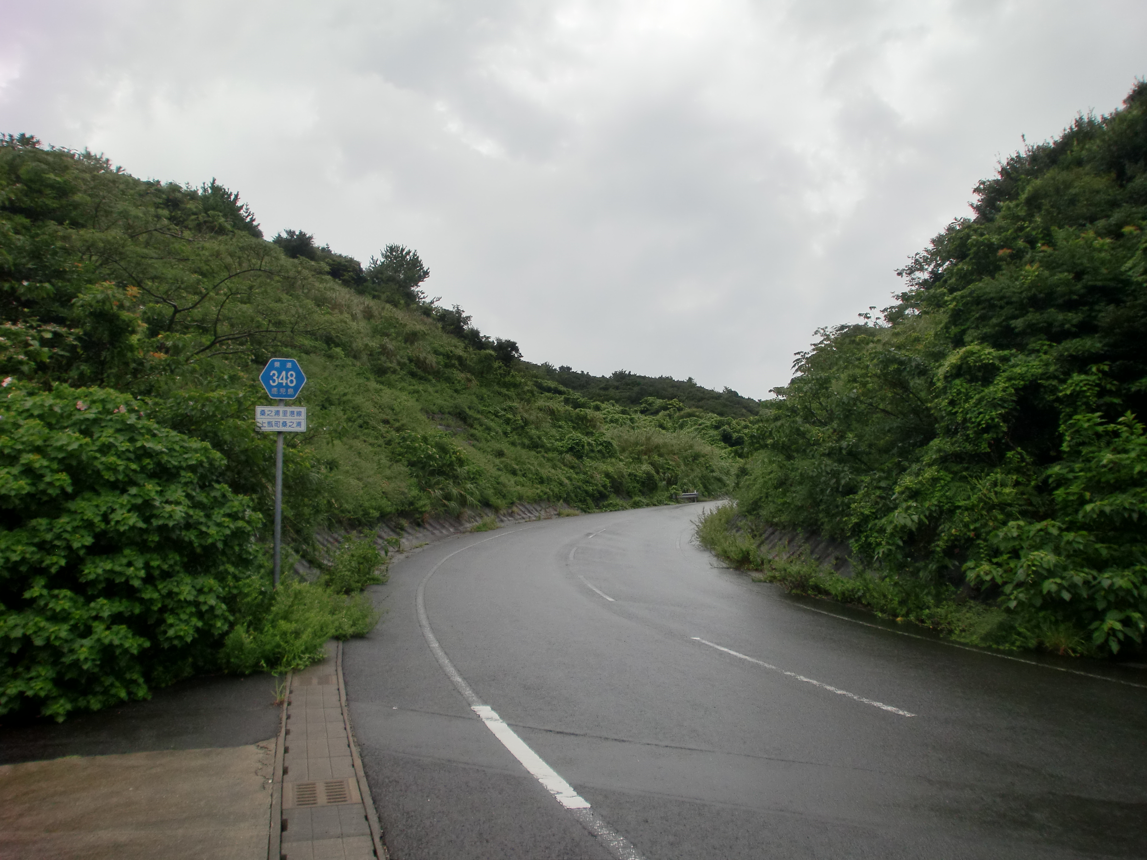 鹿児島県道348号桑之浦里港線を起点の上甑町桑之浦から終点方向を望む